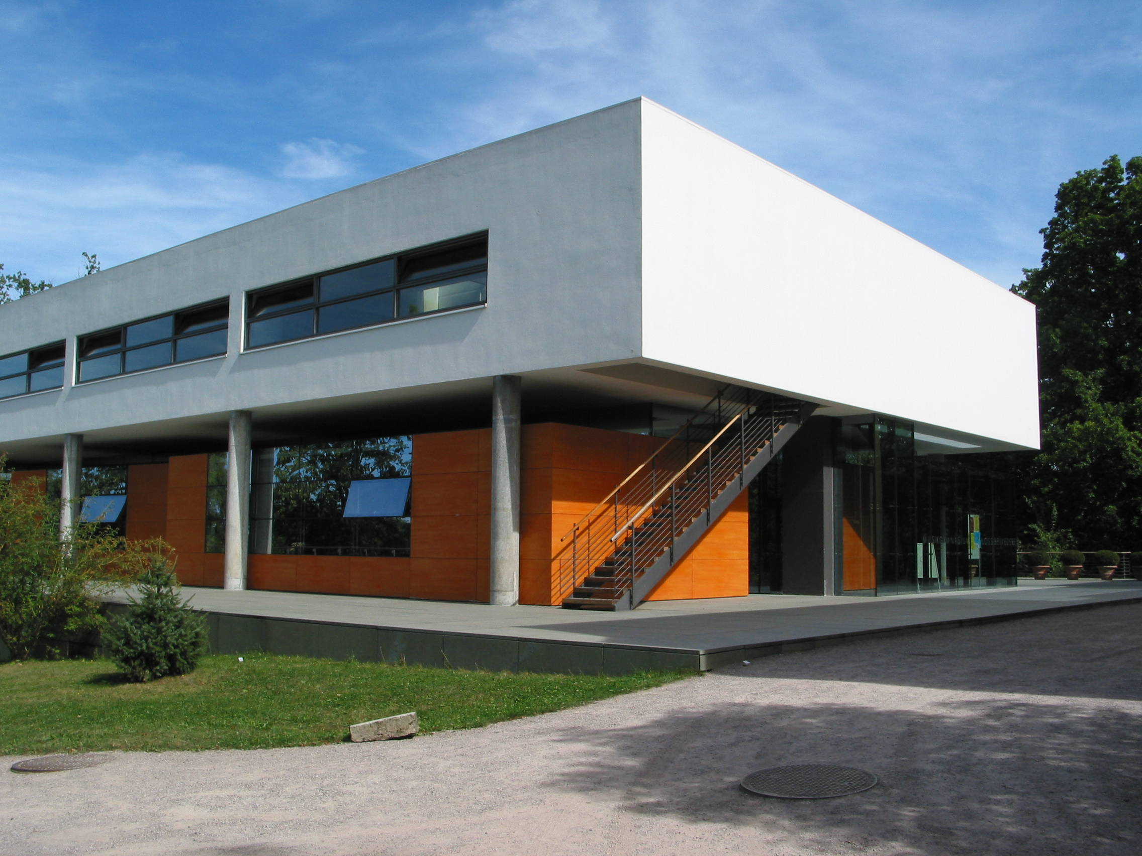 Hauptansicht des "Musikgymnasiums Schloss Belvedere" auf der Anhöhe "Eichenleite" im Süden der Stadt Weimar.